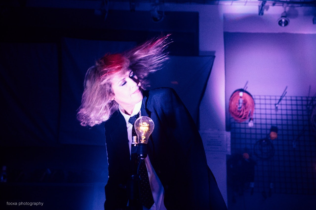 Tal Gordon